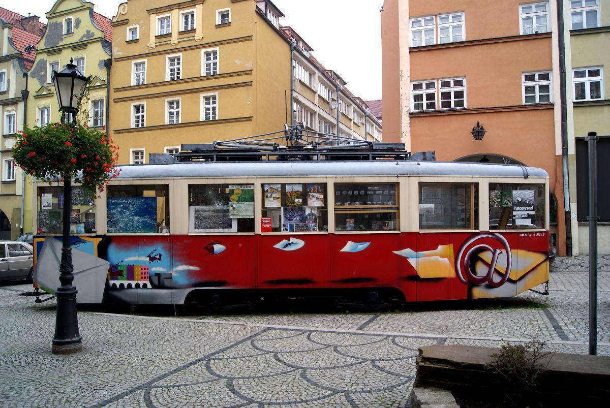 Zabytkowy tramwaj służący obecnie za sklepik z pamiątkami stojący na Placu Ratuszowym w Jeleniej Górze.